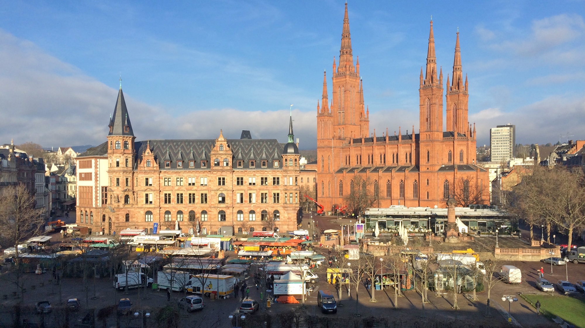 Blick auf den Wochenmarkt auf dem Dernsches Gelände